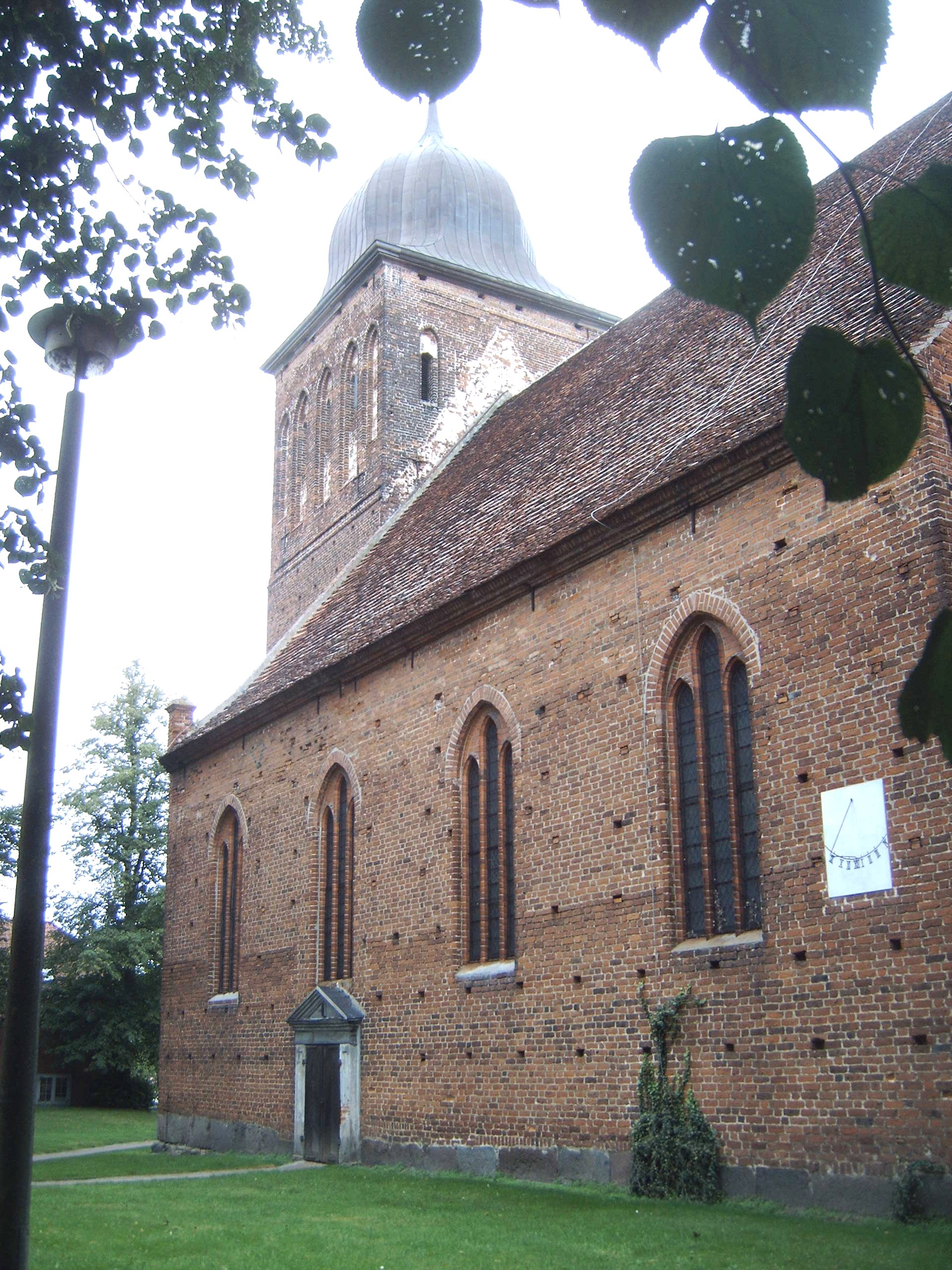 Südseite der Sankt Jacob Kirche in Gingst auf Rügen, Deutschland